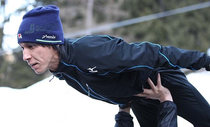 Konkurs drużynowy mężczyzn na skoczni K-120